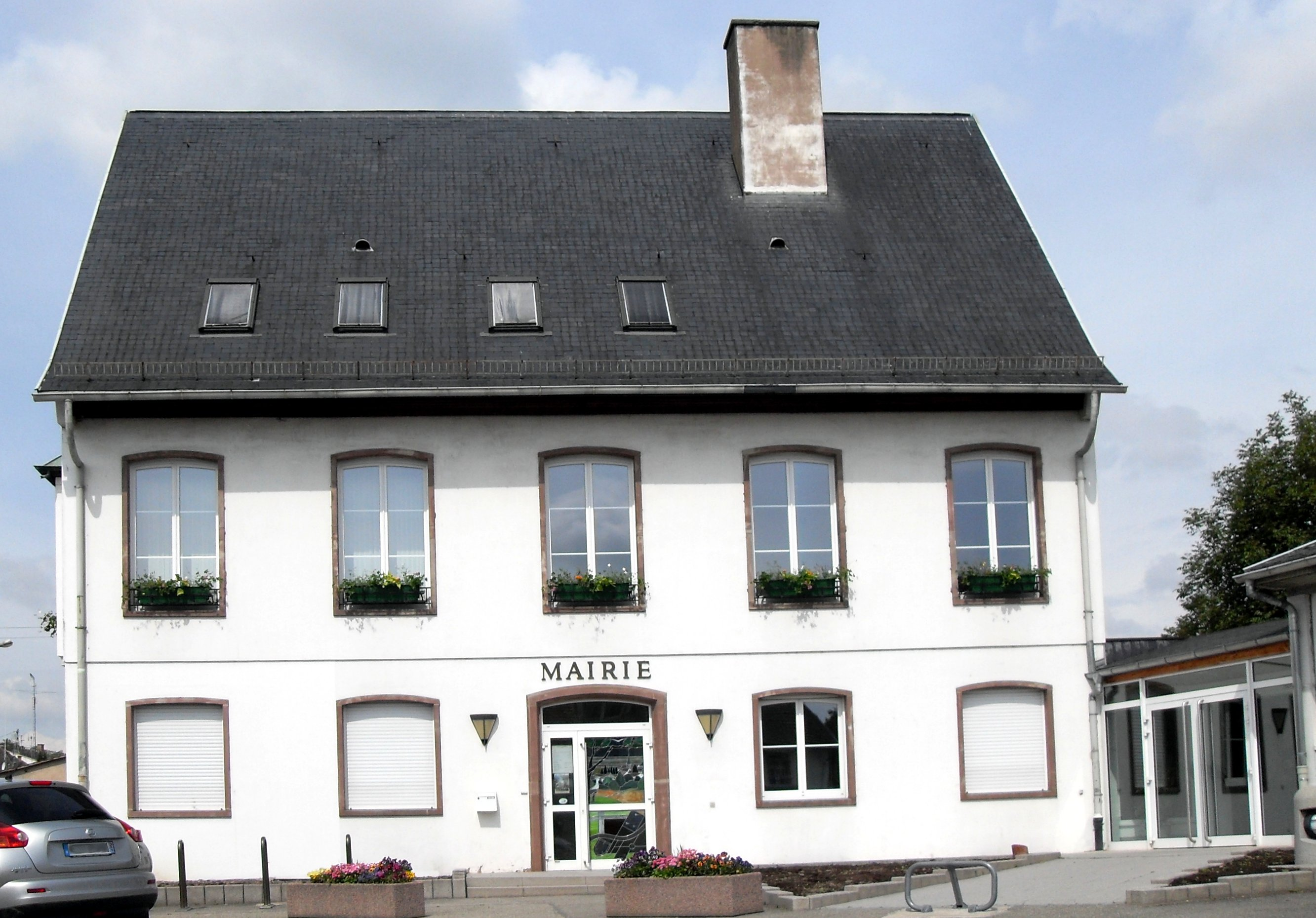 La mairie de Niederhausbergen